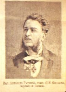 Antonino Paternò Castello, marchese di San Giuliano (1852-1914), giovane (deputato alla Camera del Regno d'Italia)